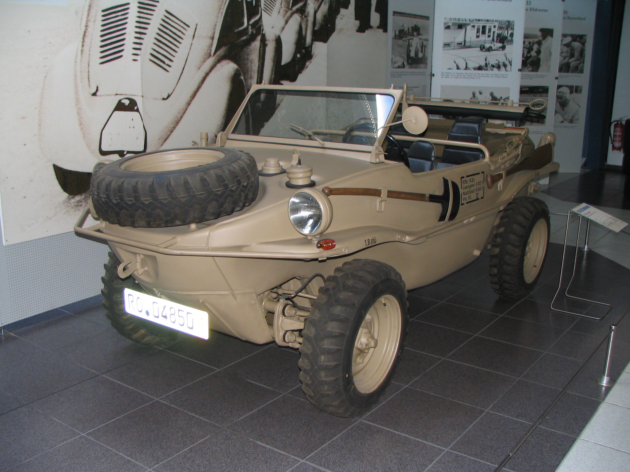 VW Schwimmwagen Typ 166